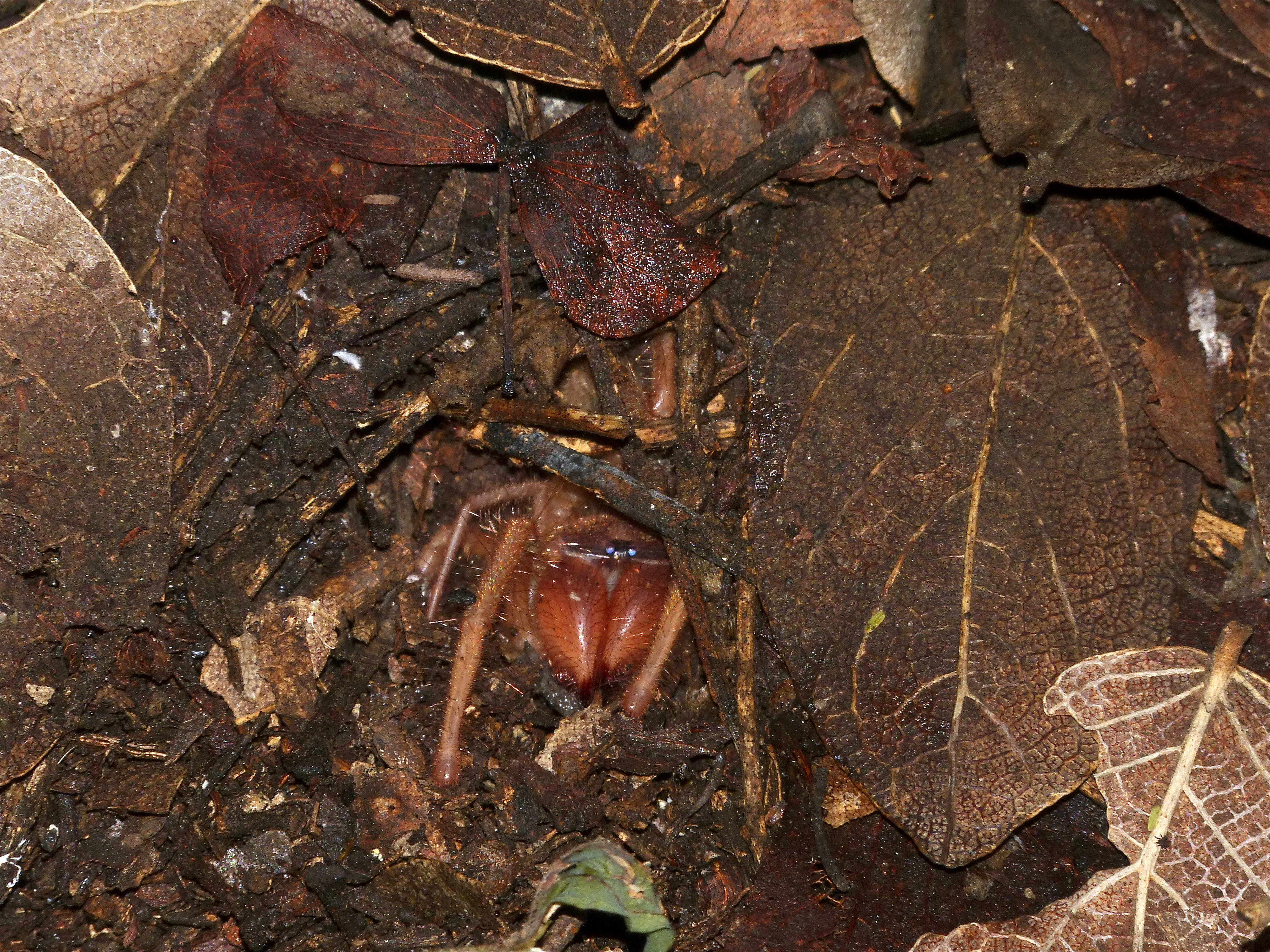 Letaba Camp, Kruger NP, SOUTH AFRICA